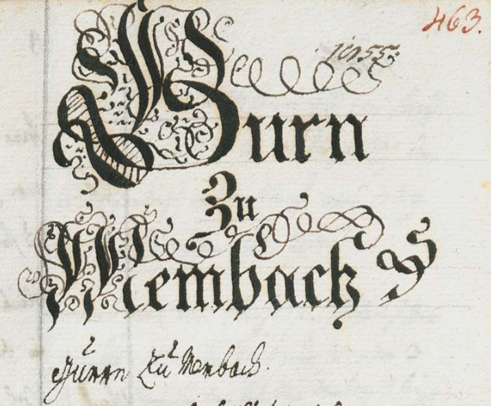 Aus dem 12. Band der alphabetischen Sammlung bayerischer Adelsgeschlechter. Veröffentlicht 1740 in Freising von Johann von Prey.